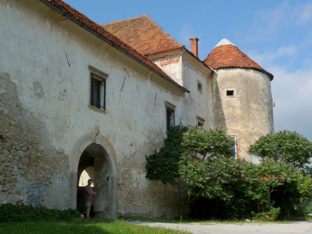 Dvorec Pogled, Mlače